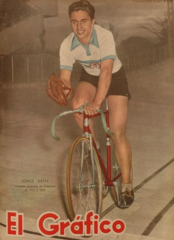 Coberta de la revista El Gráfico:Jorge Batiz